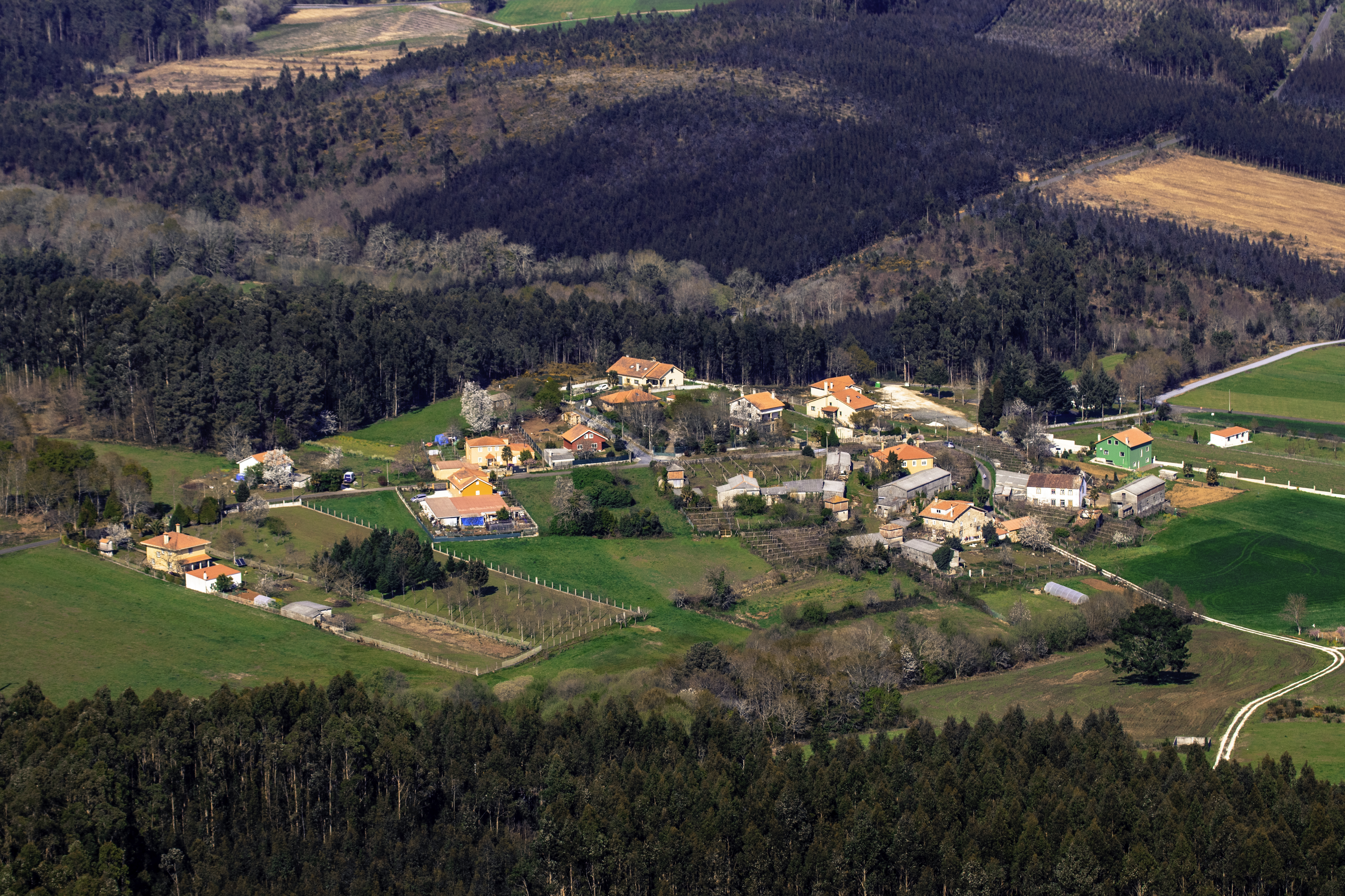 O Ardilleiro Pequeno, A Granxa, Boqueixón.